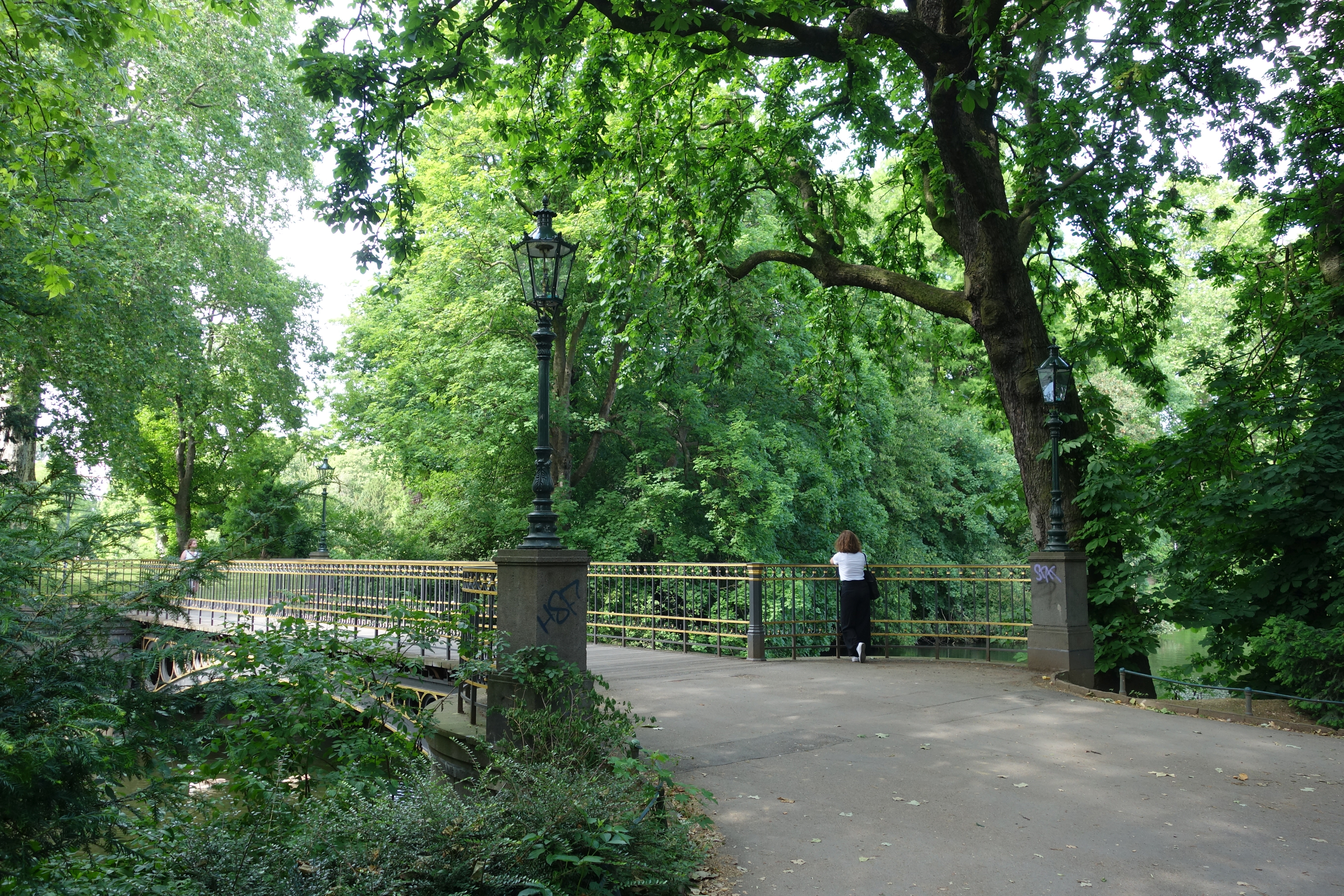 Goldene Brücke, Düsseldorf, renoviert, nach abschließender Anbringung der Brückenlaternen, Juni 2019.